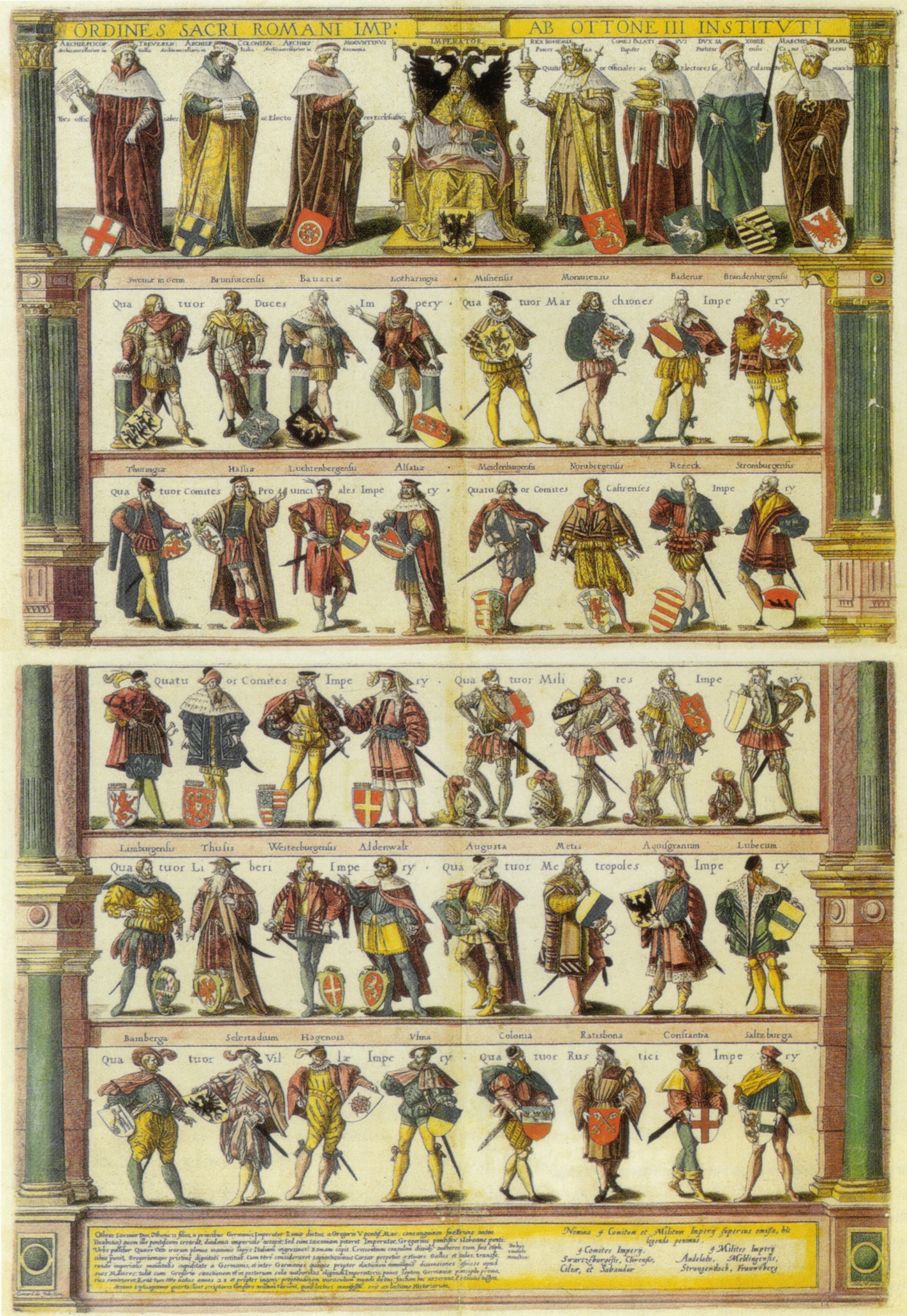 Ordines Sacri Romani Imp. Ab Ottonoe III Instituti